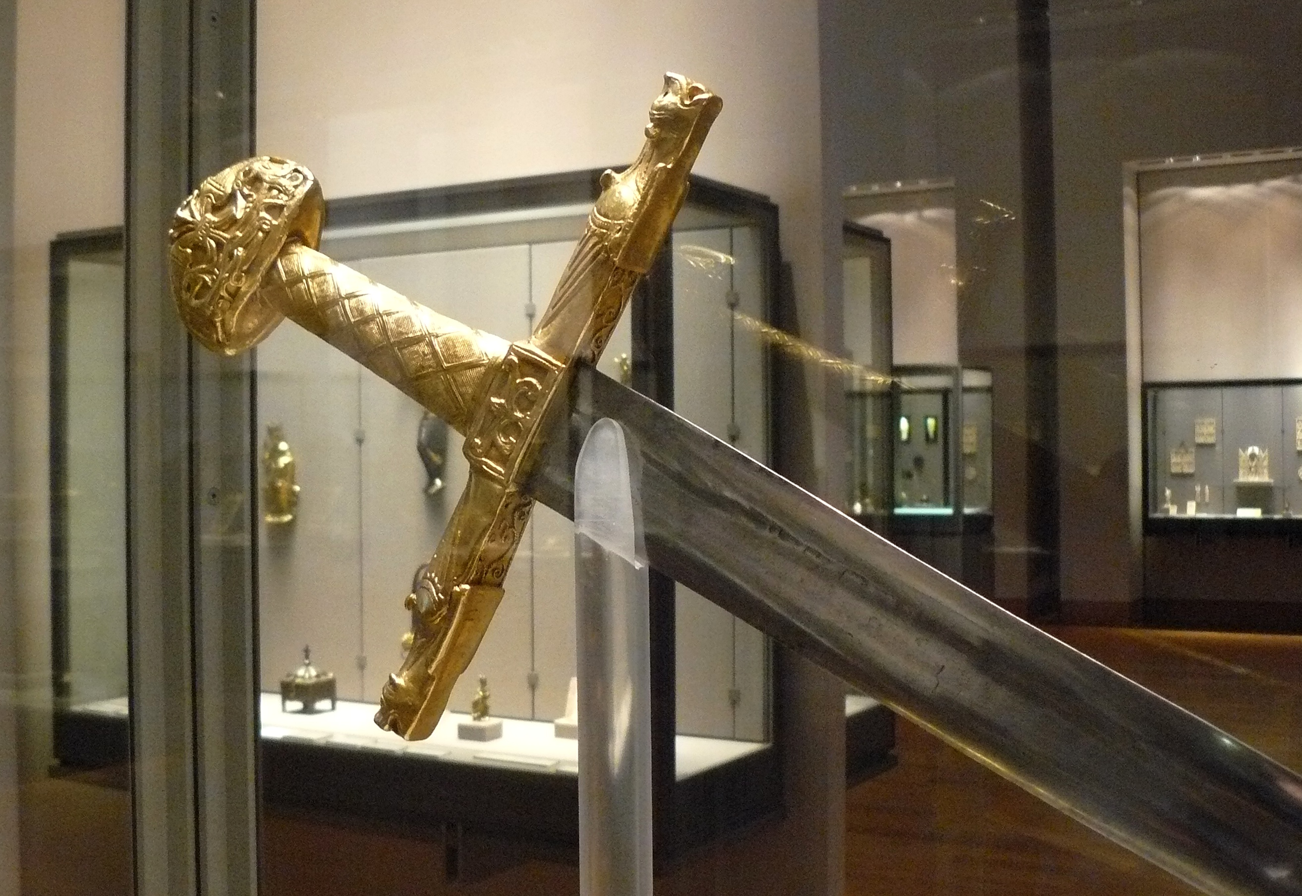 Epée du sacre des rois de France, dite "Joyeuse" ou "épée de Charlemagne" Différentes parties du Xème au XIXème siècles - Longeur 1,05 m. - Trésor de la Basilique de Saint-Denis, puis Musée du Louvre. Inv. n° MS 84